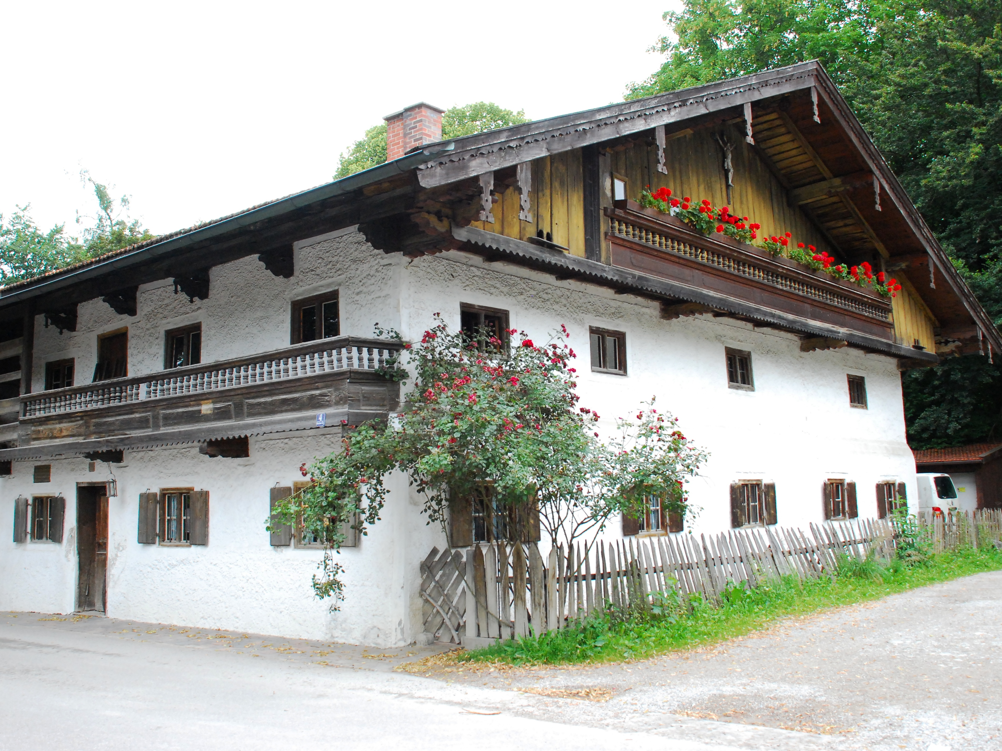 Ehemaliger Bauernhof "Sixthof", dann Heimathaus in der Münchner Straße 4 in Aying, Landkreis München, Bezirk Oberbayern, Bayern. Als Baudenkmal in der Bayerischen Denkmalliste unter Aktennummer D-1-84-137-6 aufgeführt. Laut Denkmalliste bezeichnet mit dem Jahr 1826.